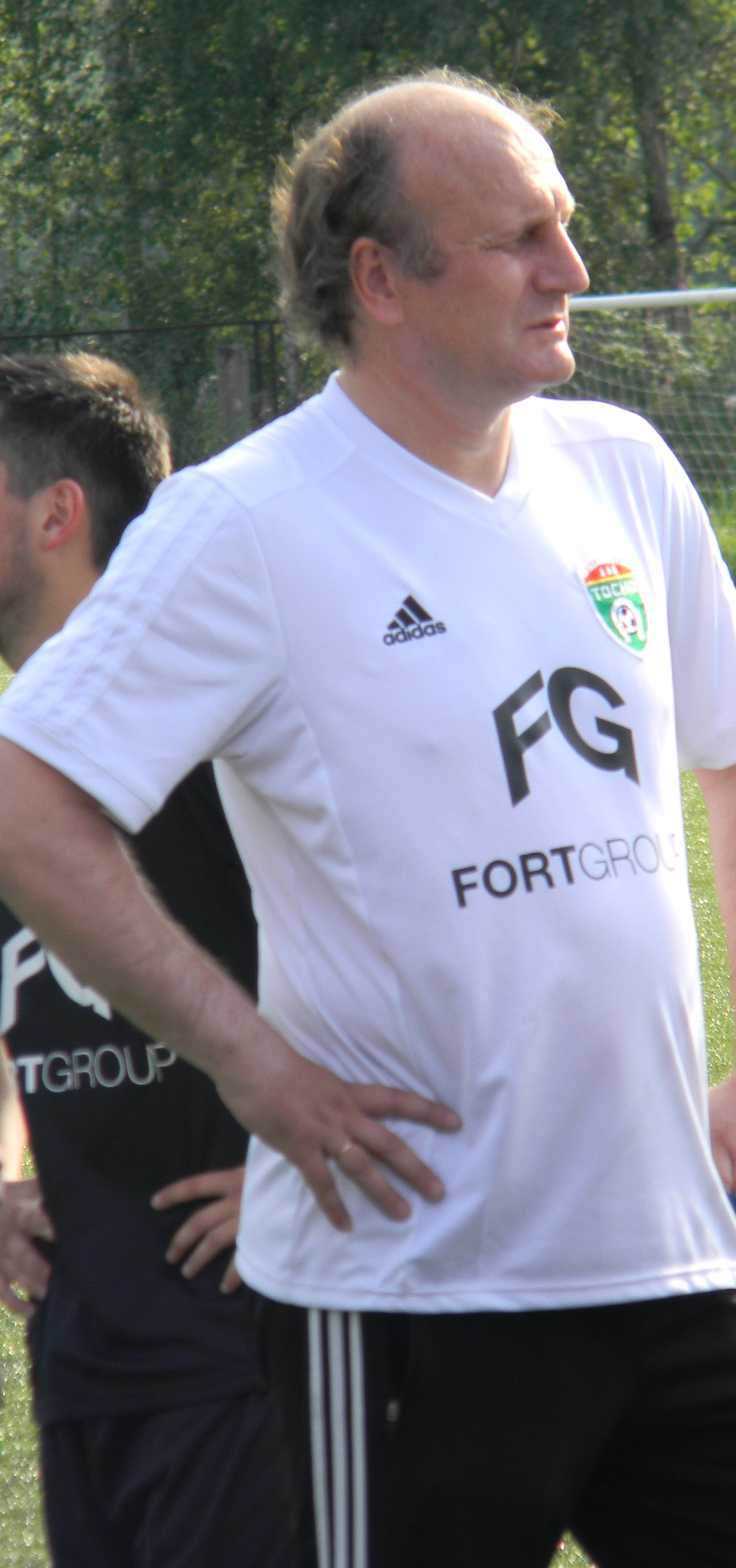 Сергей Герасимец - тренер "Тосно"-м. 12 августа 2015, стадион г. Тосно. Матч первенства МРО "Северо-Запад" "Тосно"-м - "Луки-Энергия"